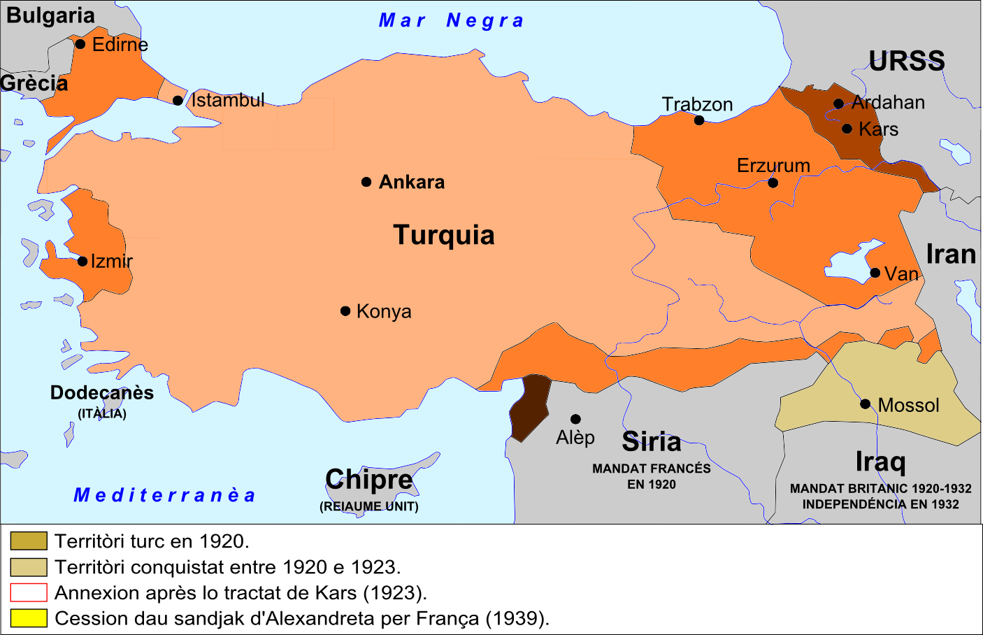 Turquia après lo Tractat de Laussana (1923).